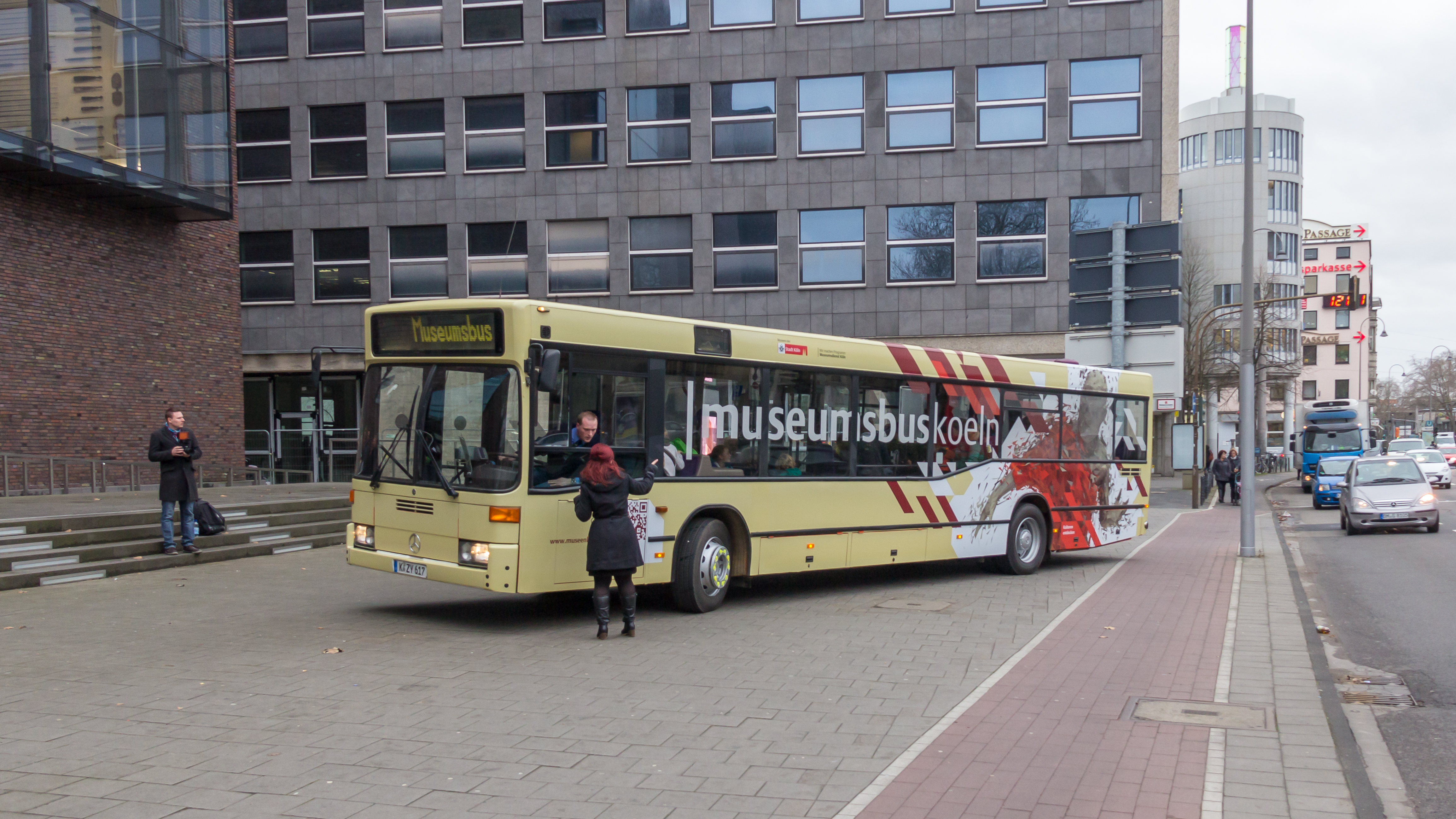 Vorstellung und Pressekonferenz des neuen „museumsbus koeln“ durch den Museumsdienst Köln. Es fand eine Jungfernfahrt für eine Kulturklasse des Abtei-Gymnasiums Brauweiler von Pulheim nach Köln zum Rautenstrauch-Joest-Museum statt. Der Bus bringt seit dem 12. Januar 2015 im Wechsel jeweils zwei Wochen hintereinander Schulklassen aus dem Rhein-Sieg-Kreis, dem Rhein-Erft-Kreis, dem Kreis Euskirchen, dem Rheinisch-Bergischen und dem Oberbergischen Kreis zu allen städtischen Museen und dem Käthe-Kollwitz-Museum.